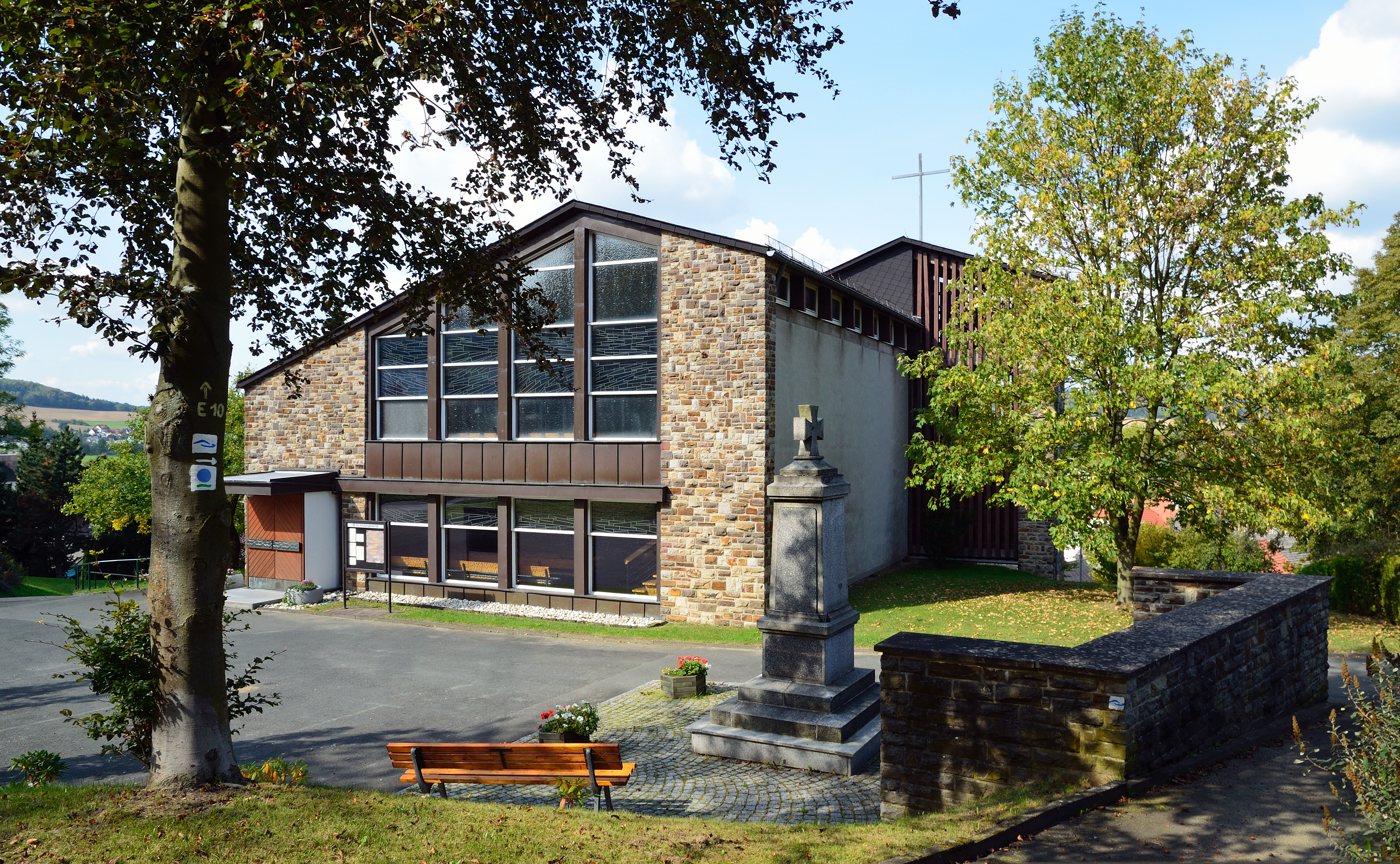 Kirche in Erdhausen